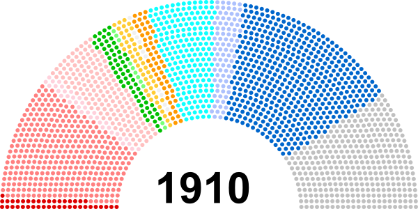 Représentation en hémicycle des conseillers régionaux et territoriaux français élus les 6 et 13 décembre 2015. FG: 41 seats PS: 355 seats PRG: 36 seats DVG: 155 seats EELV: 64 seats Divers écologistes: 11 seats Régionalistes: 48 seats Divers: 10 seats MoDem: 54 seats UDI: 199 seats DVD: 86 seats LR: 493 seats FN: 358 seats